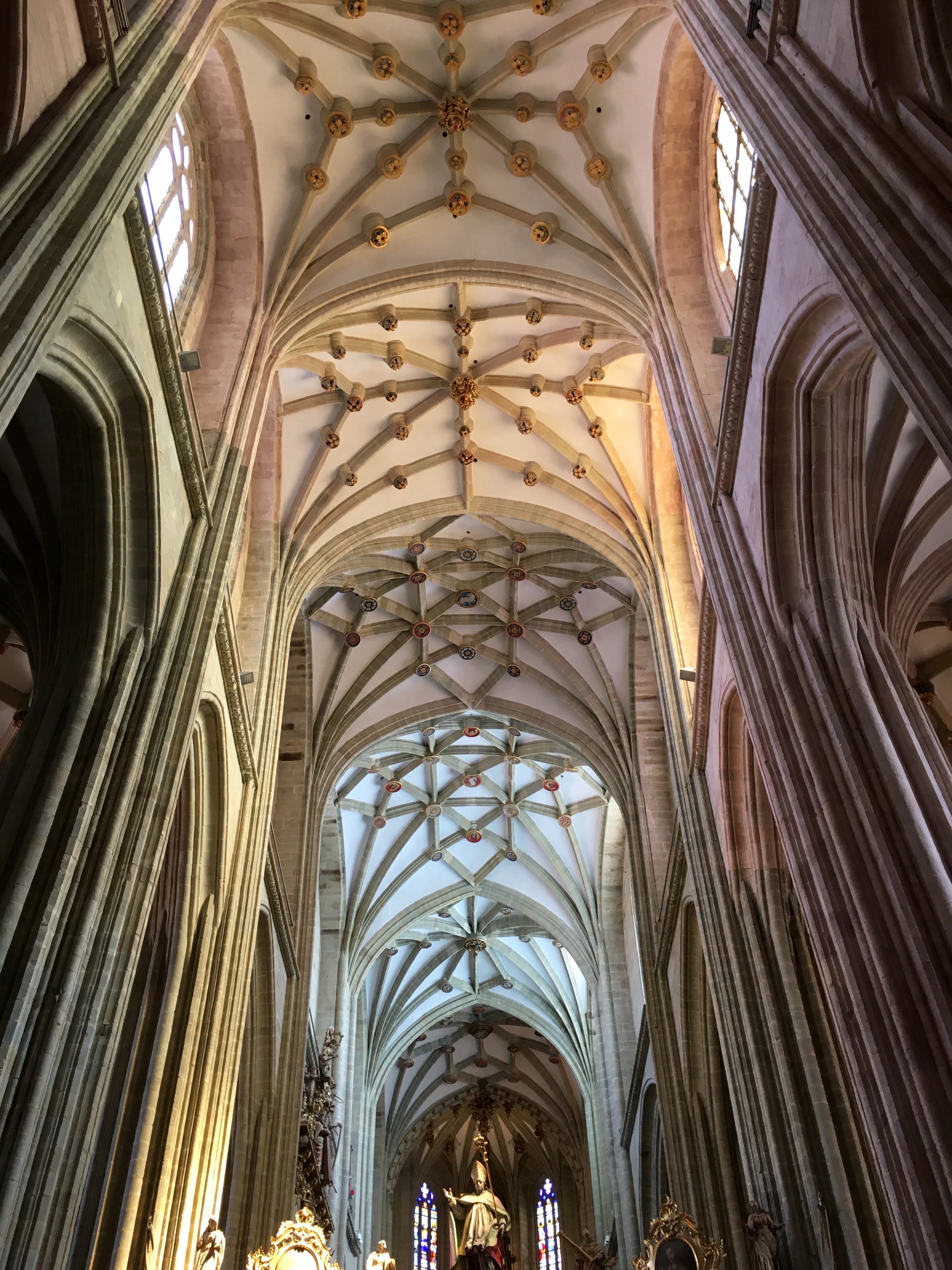 Interior de la catedral de Astorga.